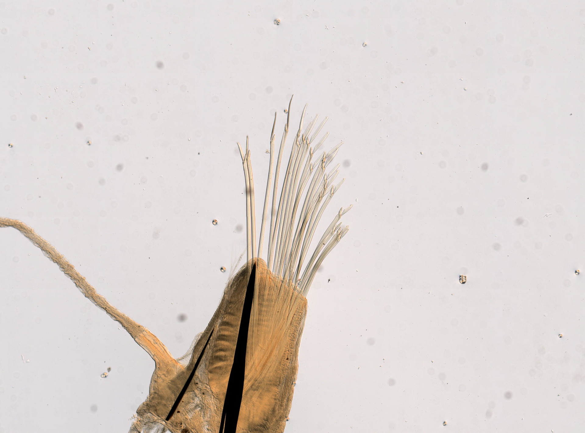 PRESERVED_SPECIMEN; ; ; 70% alc.; microslide; IZ number 2502; lot count 1; Microslide 01, glycerin, parapodia; Microslide 02, glycerin, parapodia; 1957-10-02T00:00:00Z